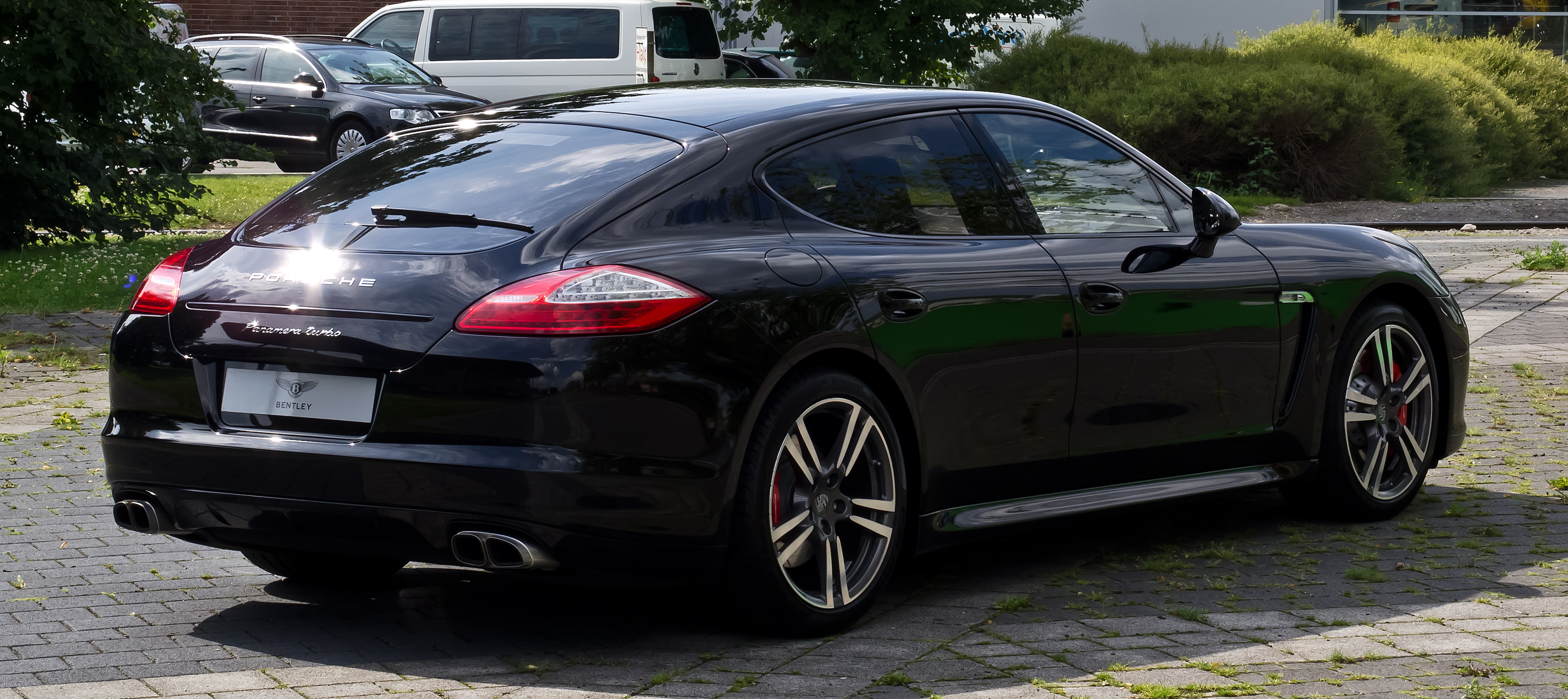 Porsche Panamera Turbo (970)